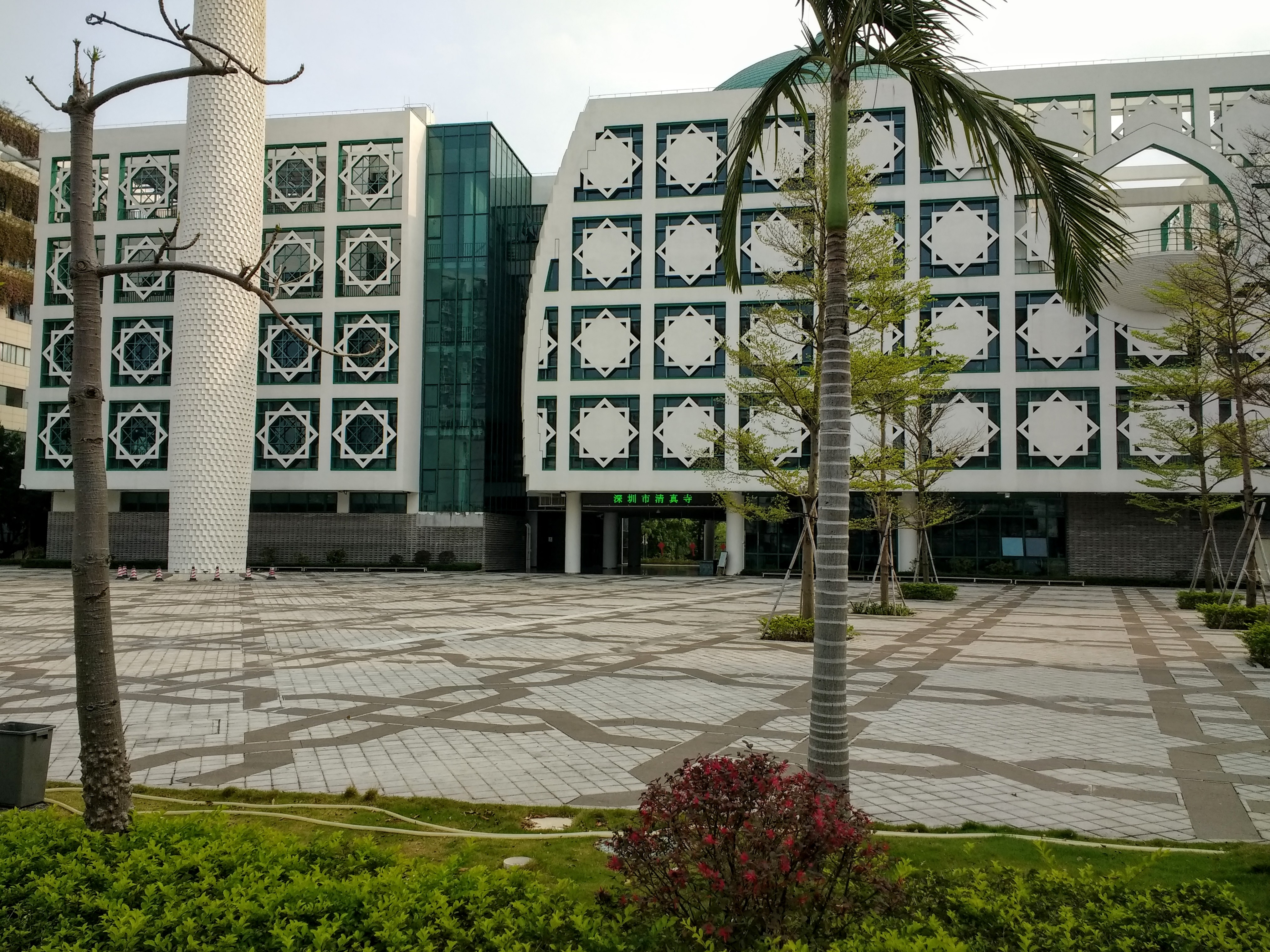 深圳清真寺